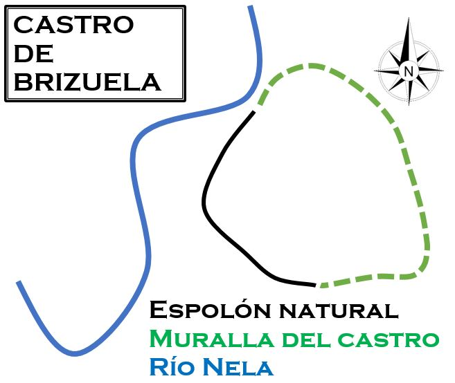 Castro de Brizuela, principales estructuras